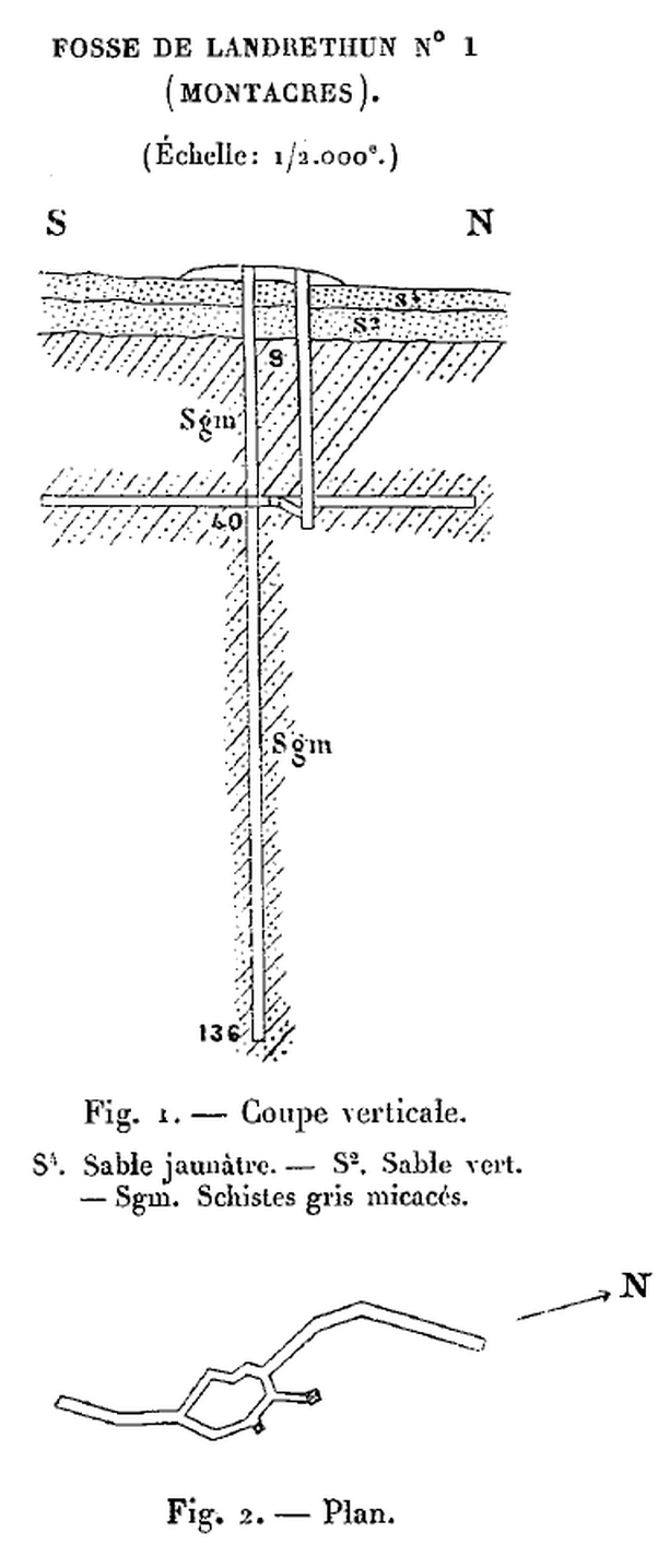 Coupe verticale des puits de la fosse de Landrethun n° 1 dite Montacres, Mines du Boulonnais.